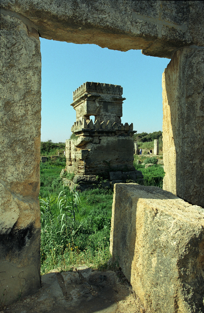 Syria, Amrit